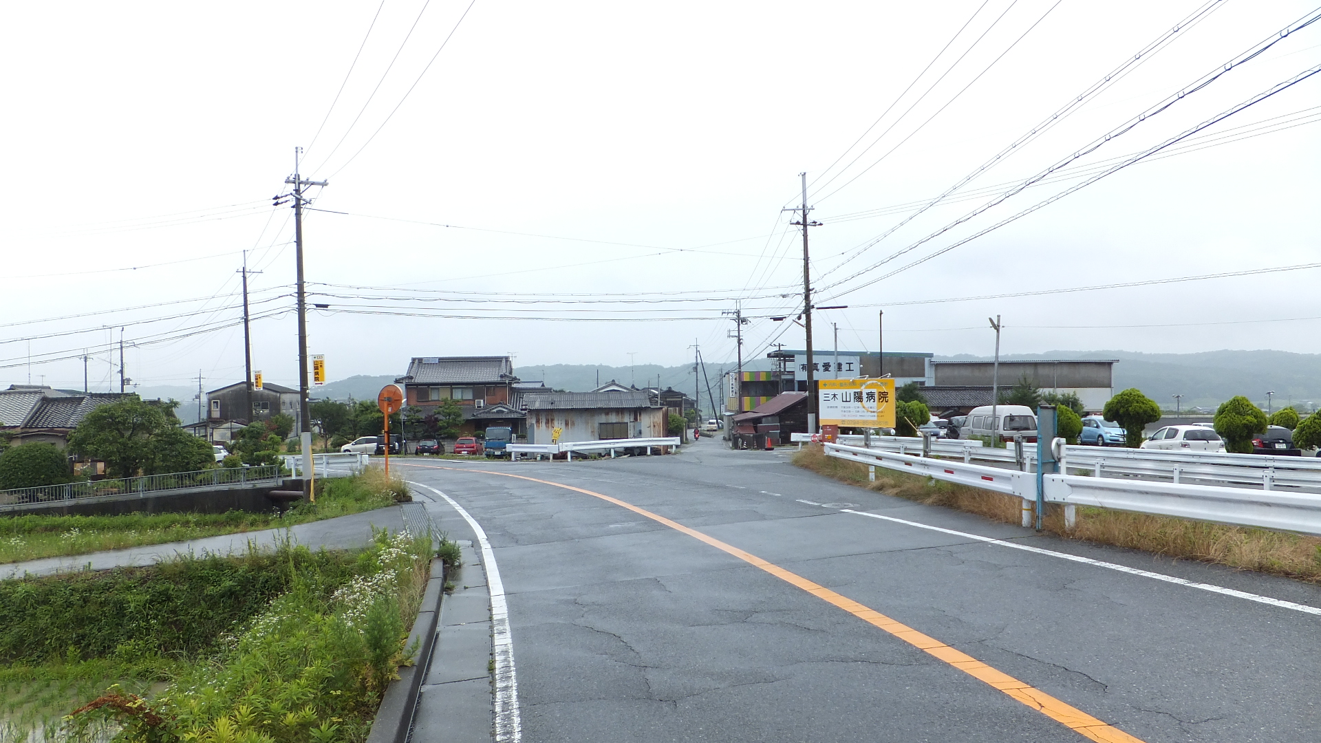 兵庫県三木市志染町吉田 兵庫県道514号志染土山線